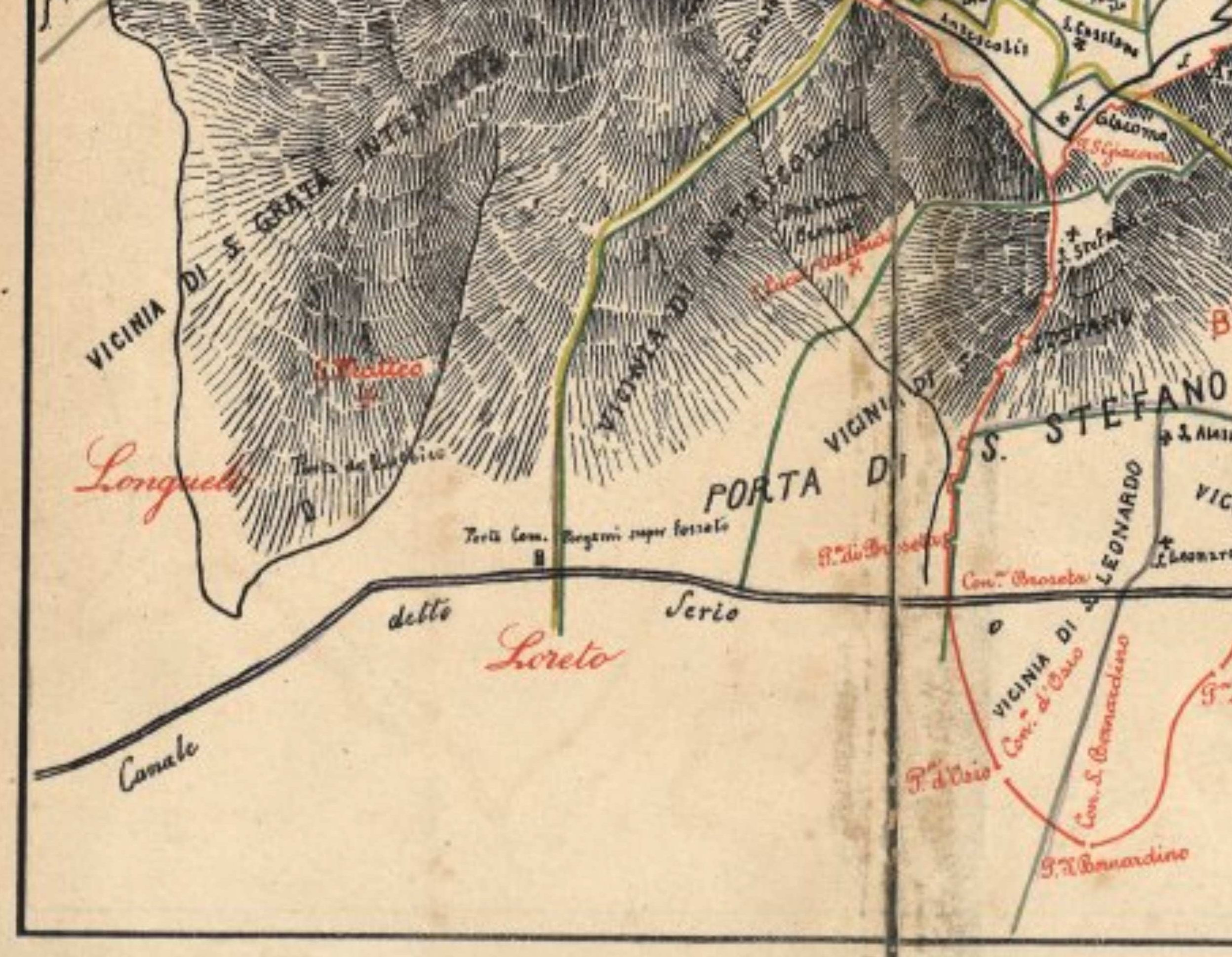 Mappa delle Vicinie di Bergamo nel XIII secolo